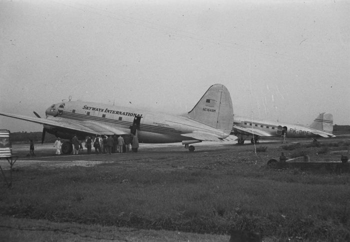 negatief. Vliegtuigen van Skyways International en de KLM op het vliegveld van Makassar